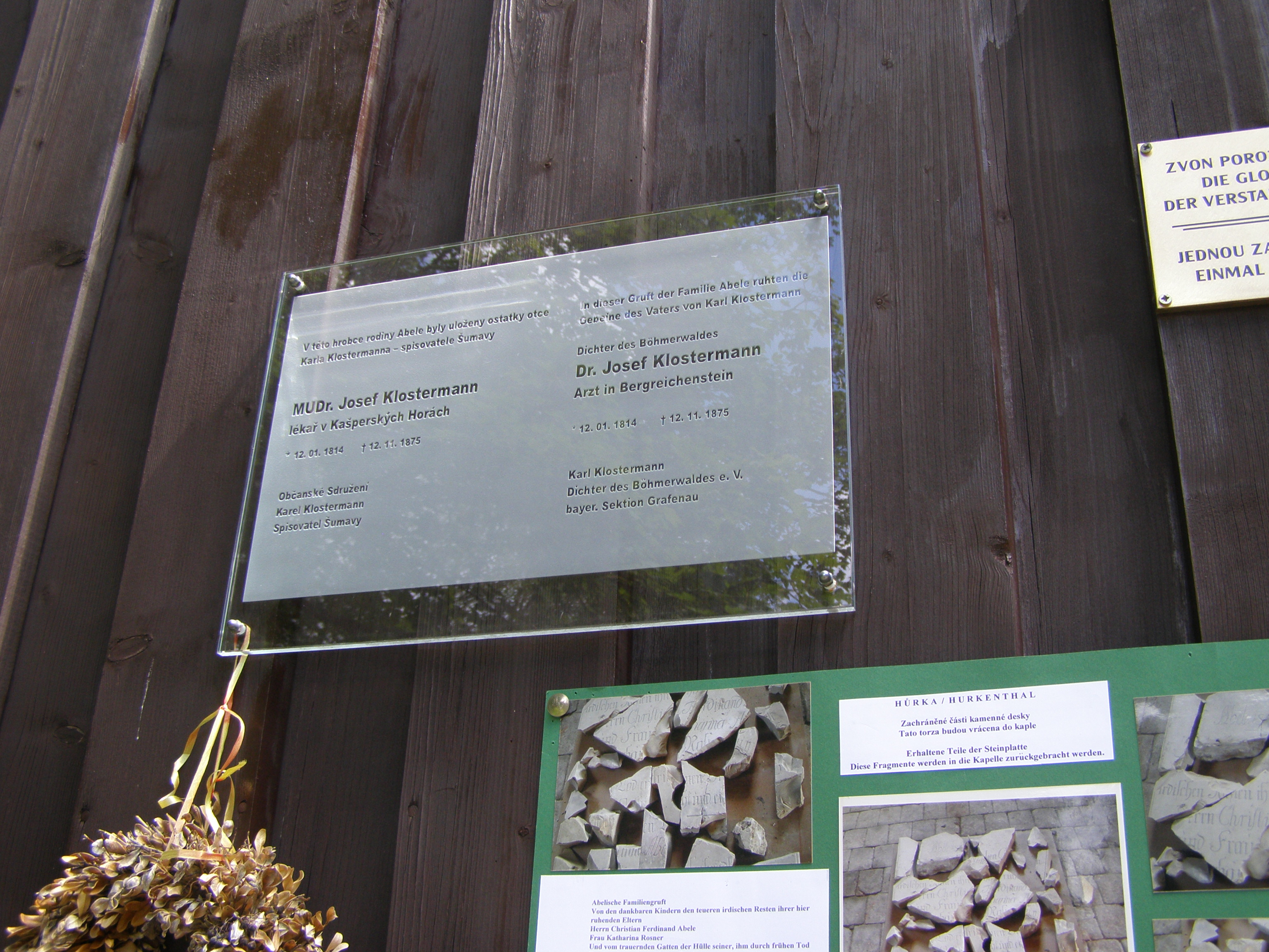 Skleněná pamětní deska umístěná na čelní stěně hřbitovní kaple svatého Kříže na místě bývalé obce Hůrka (Hurkenthal); (dříve též Česká Huť, 990 metrů nad mořem, cca 10 km od Železné Rudy na Šumavě, Česká republika). Deska připomíná MUDr. Josefa Klostermanna (* 12. ledna 1814 - † 12. listopadu 1875) lékaře v Kašperských Horách, jehož ostatky byly uloženy v hrobce sklářských rodin Abelů. Josef Klostermann byl otcem spisovatele Šumavy Karla Faustina Klostermanna (* 13. února 1848 - † 16. července 1923).